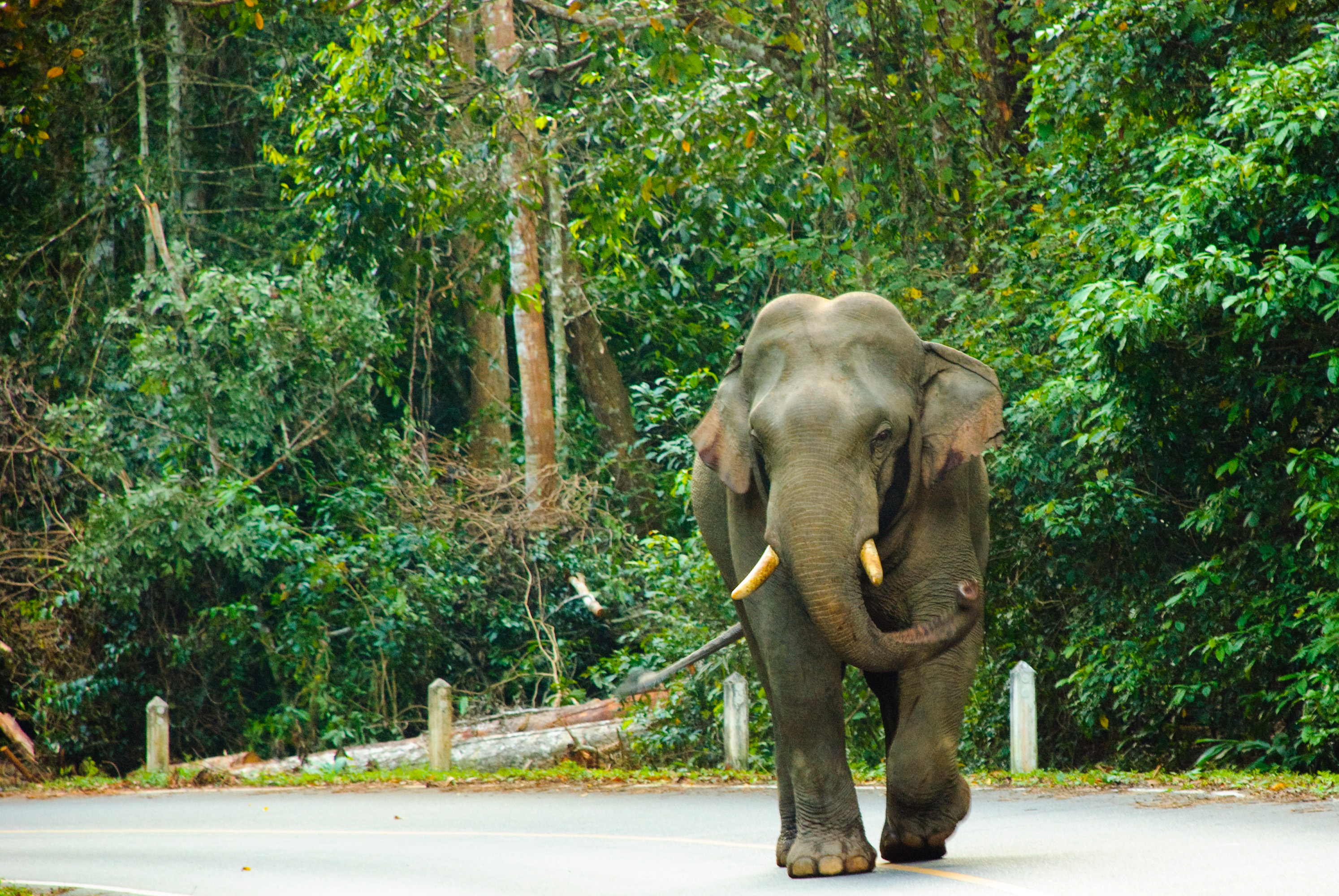 ช้างป่าออกหากินบนถนนธนะรัชต์